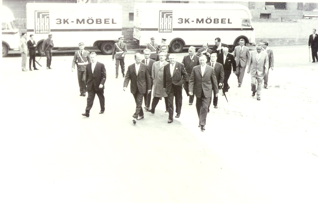 3K-Möbelwerke, Lastwagen mit neuerem Logo, Karl Kübel (vorne rechts)